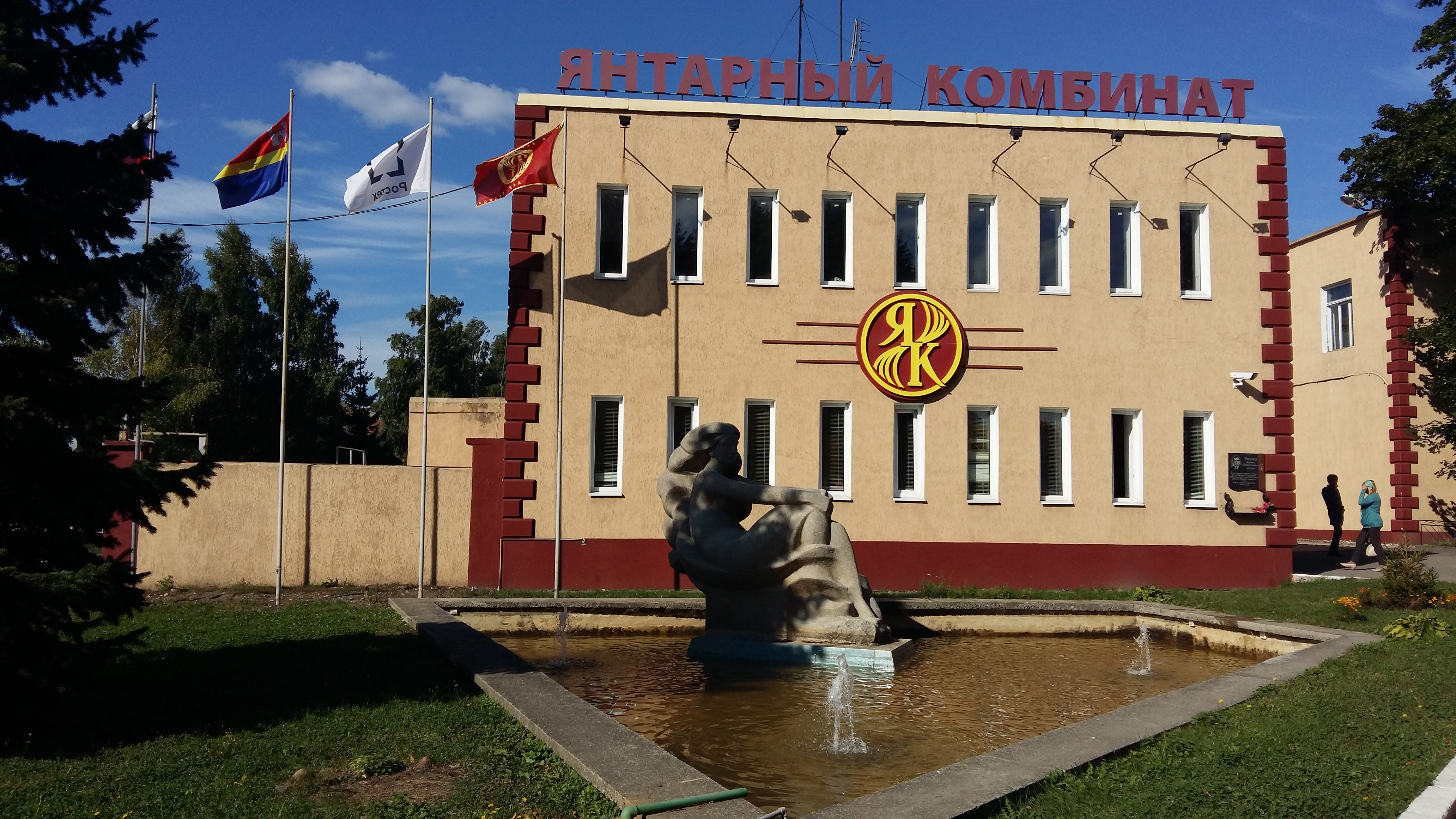 Калининградский янтарный комбинат